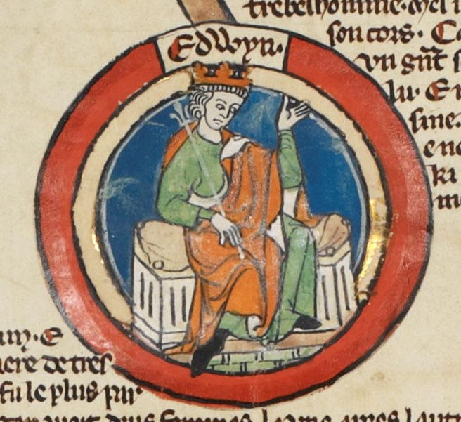 Miniature d'Eadwig d'Angleterre dans une généalogie royale du XIVe siècle.